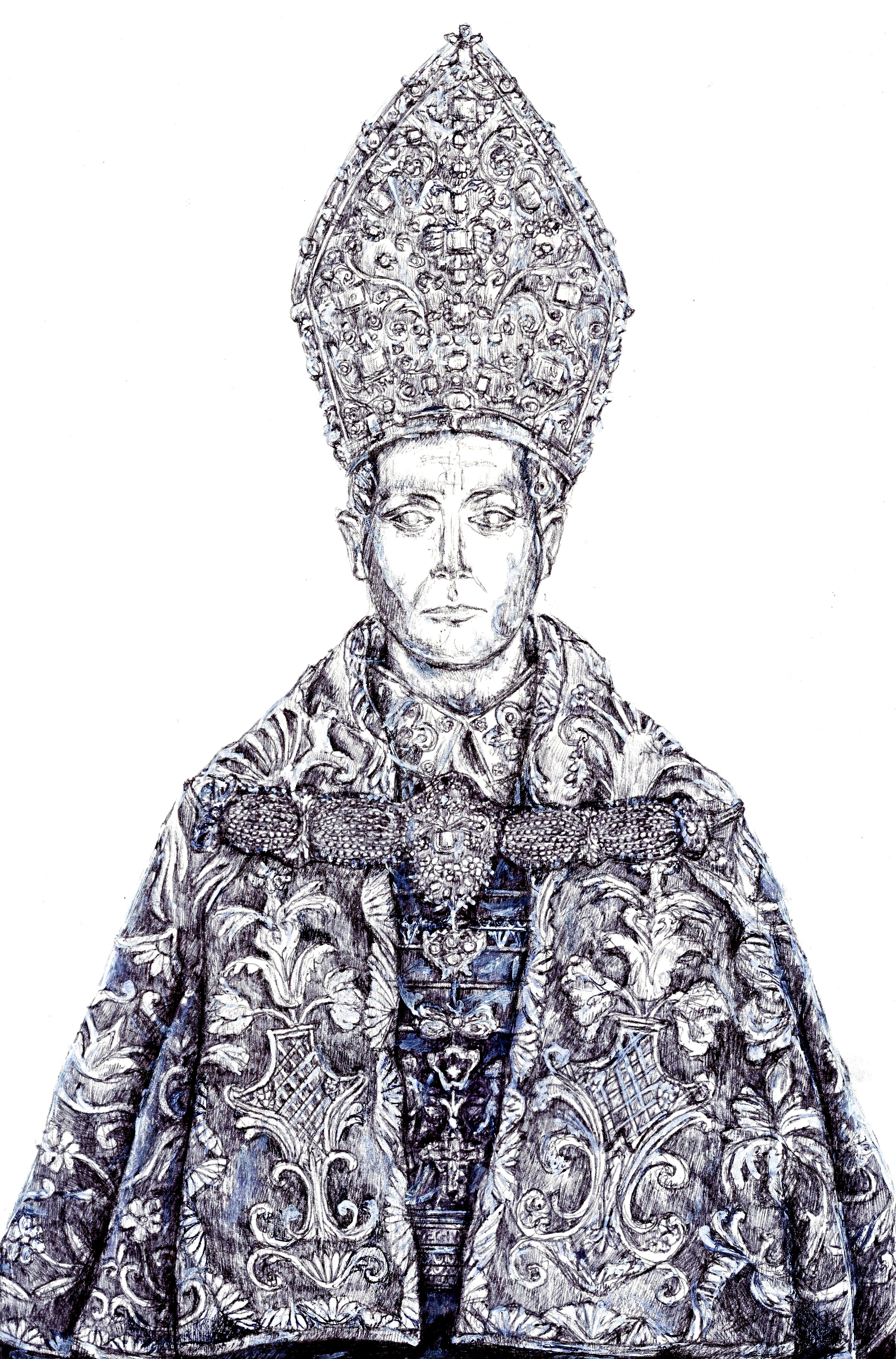 "Januarius" (busto-reliquiario di San Gennaro vescovo e martire, conservato nel Duomo di Napoli), illustrazione dell'artista Giovanni Guida, chine e grattage su graphia, 2020.